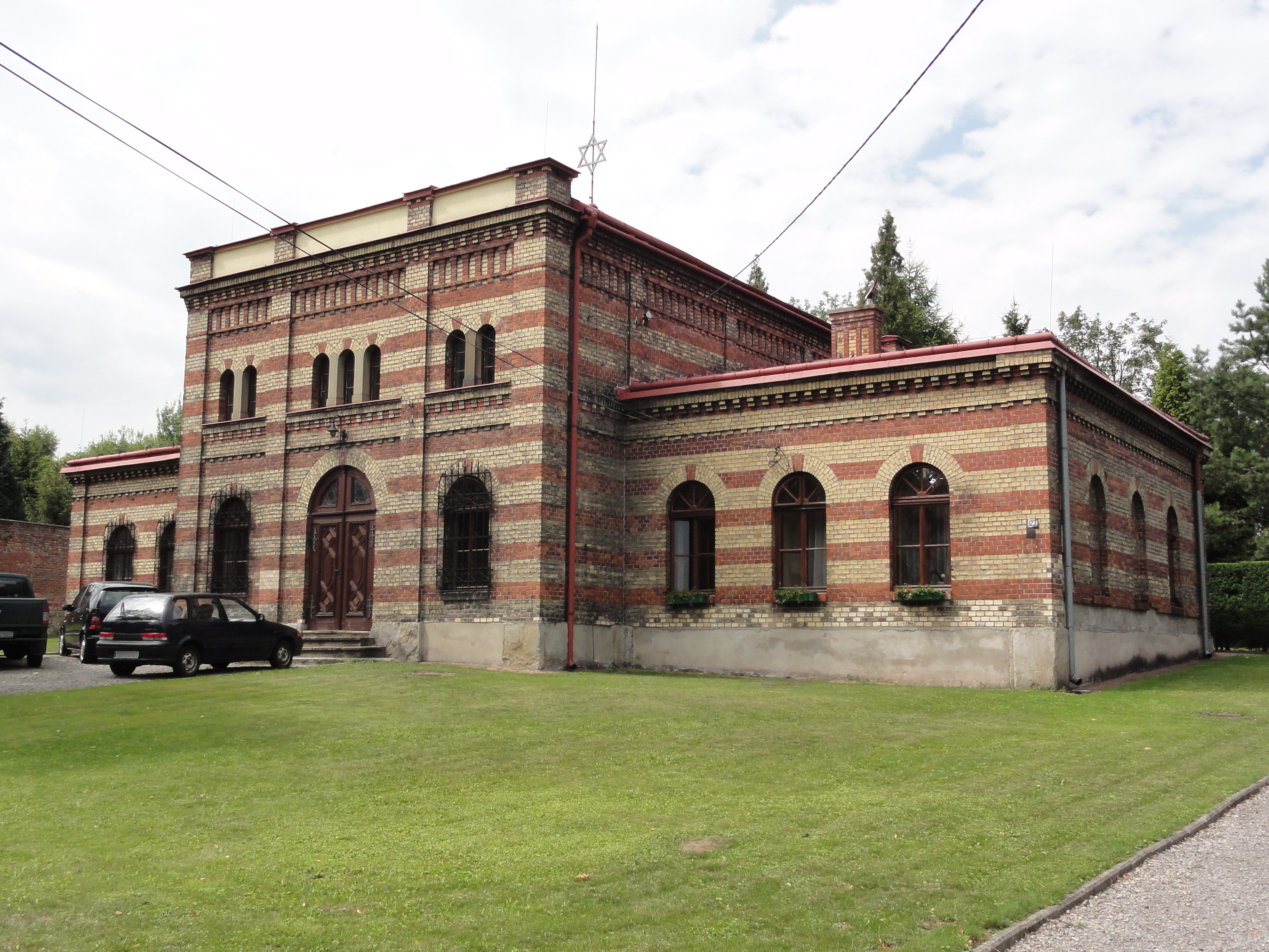 Cmentarz żydowski w Bielsku-Białej, na ul. Cieszyńskiej 92, dom przedpogrzebowy